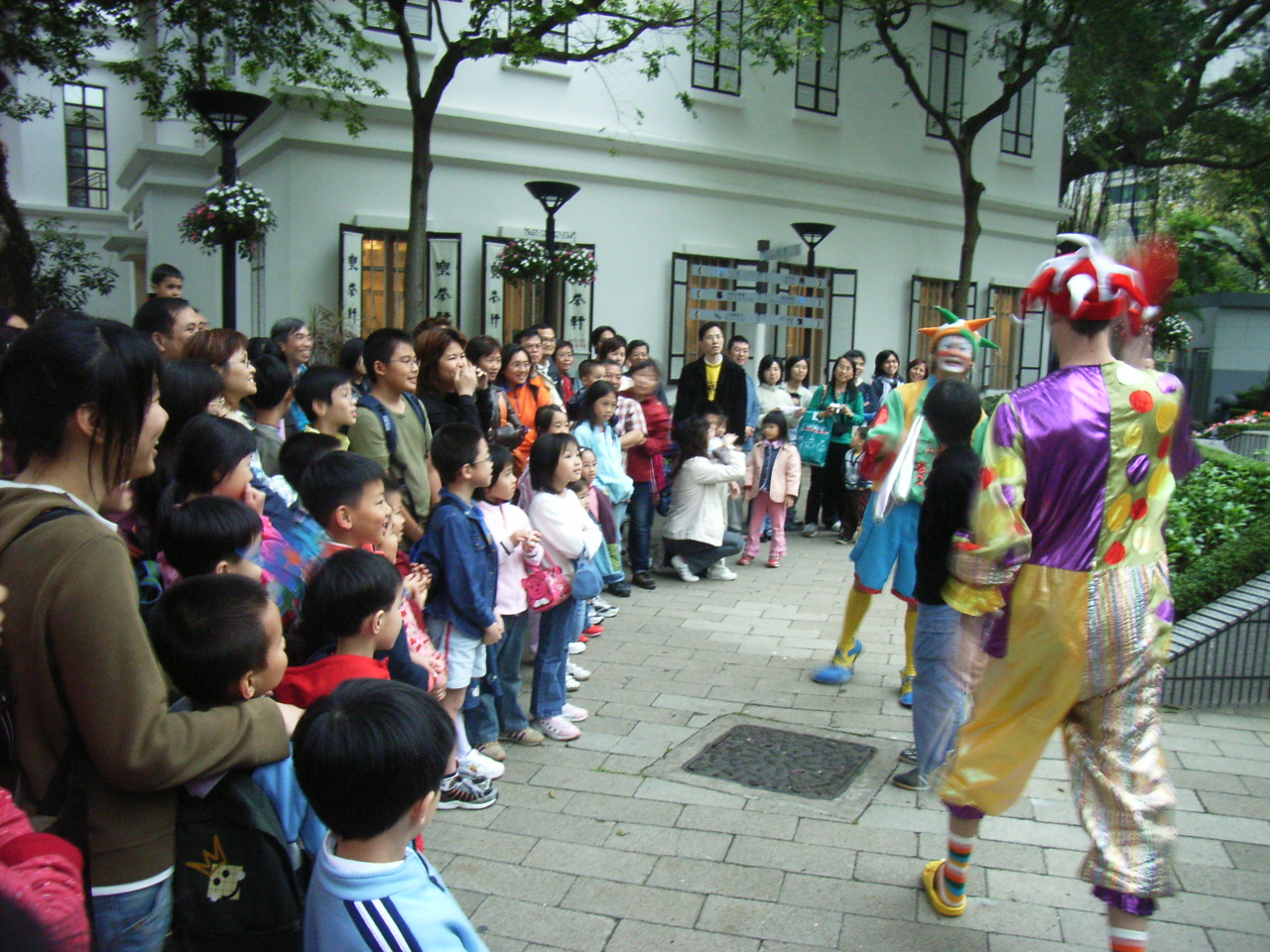 Hong Kong Park, 香港公園